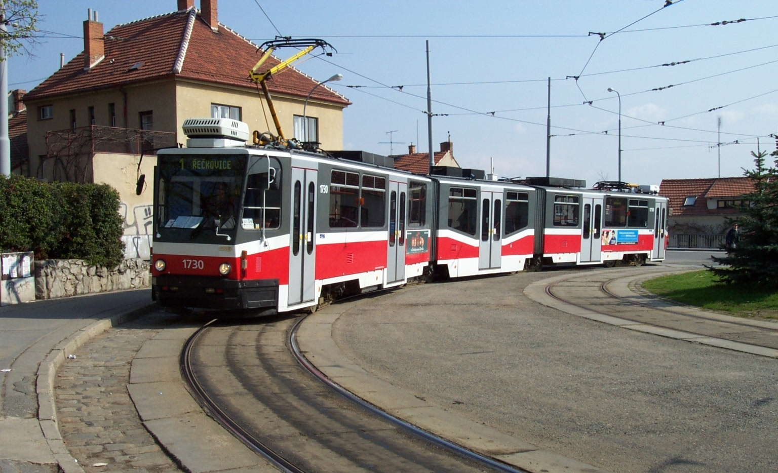 Tramcar KT8D5N in Brno, Czech Republic - Tramvaj KT8D5 v Brnu, na konečné v Řečkovicích